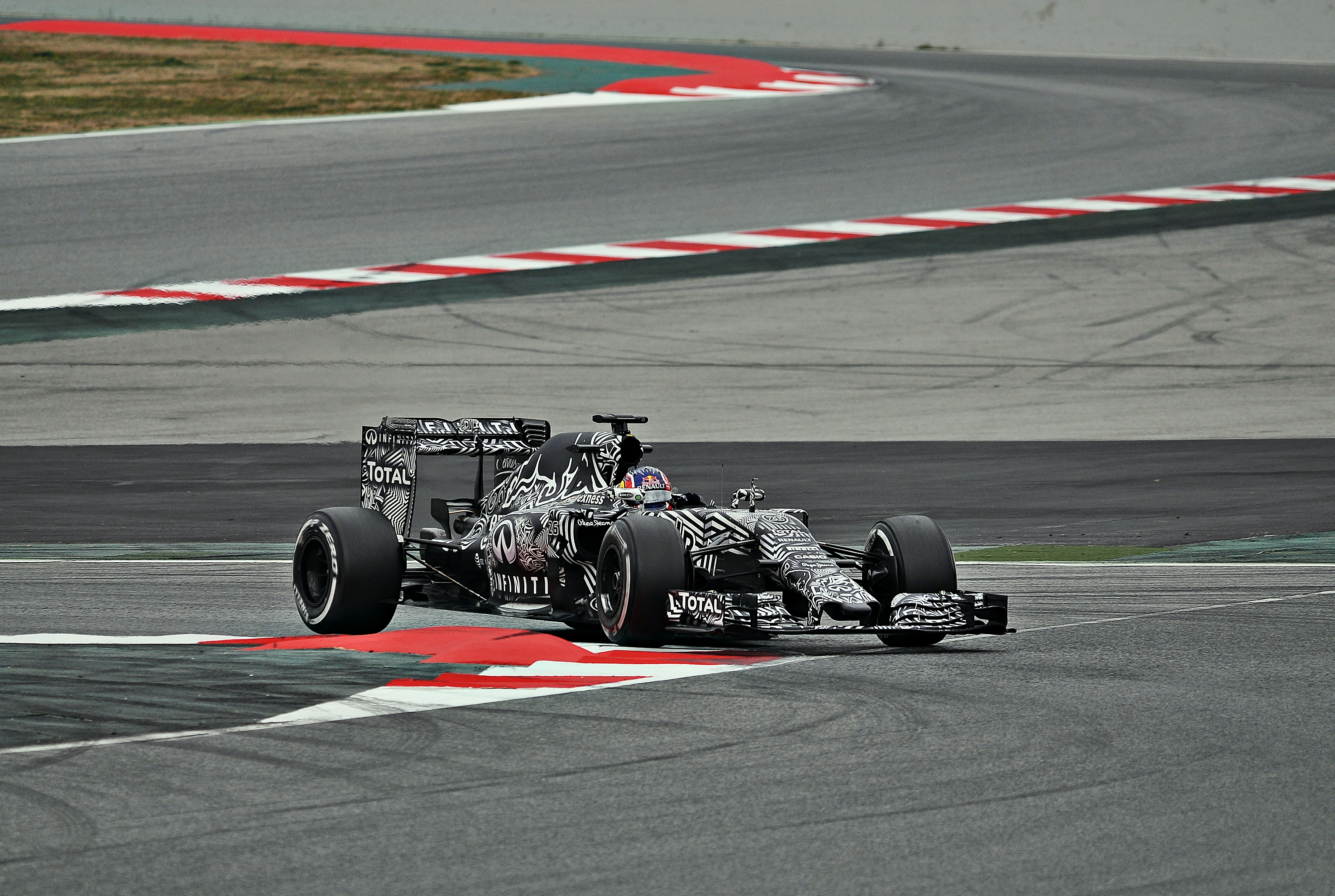 Test days Barcelona 2015